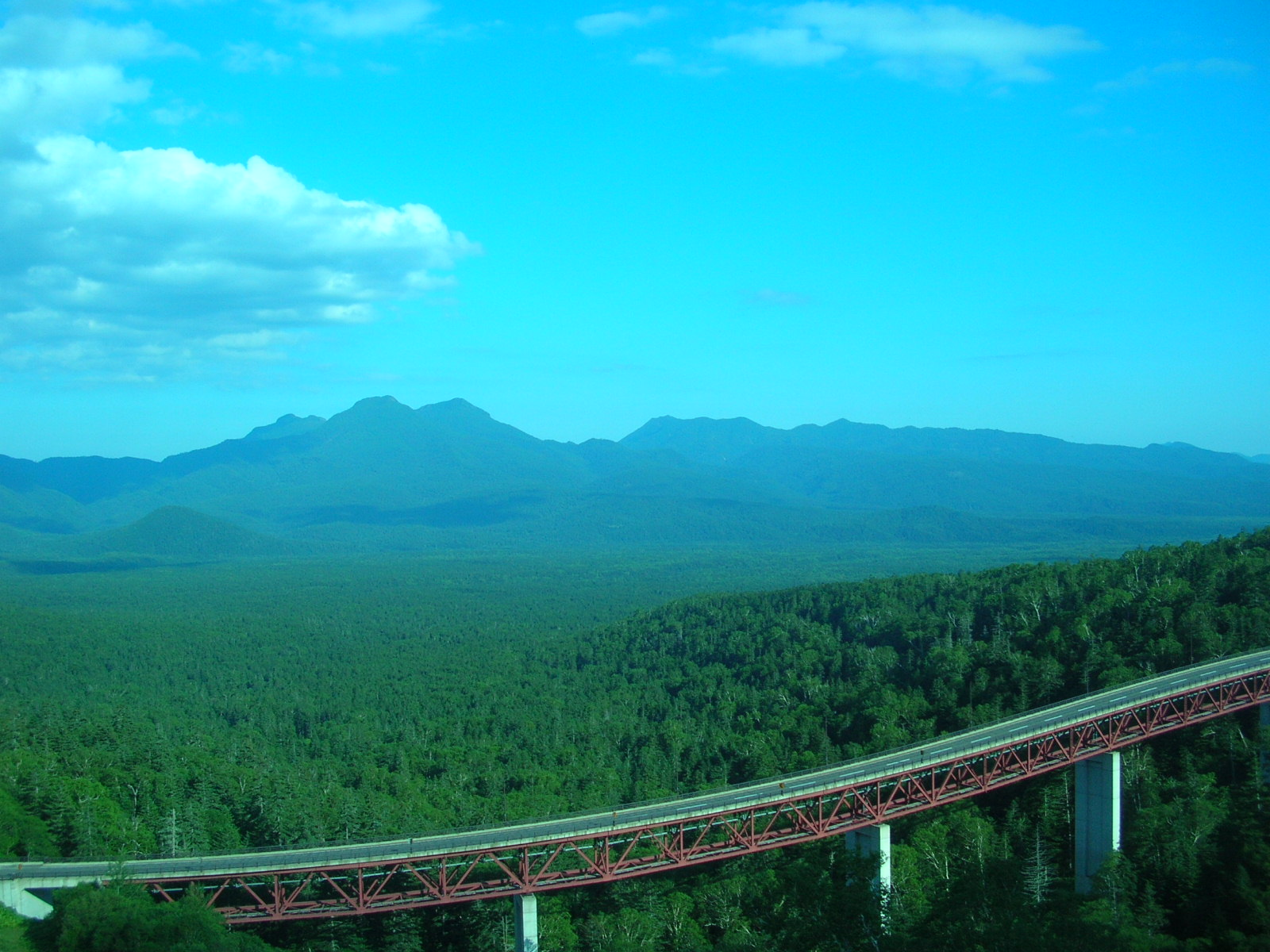 三国峠 夏（Mikuni mountain pass、summer）